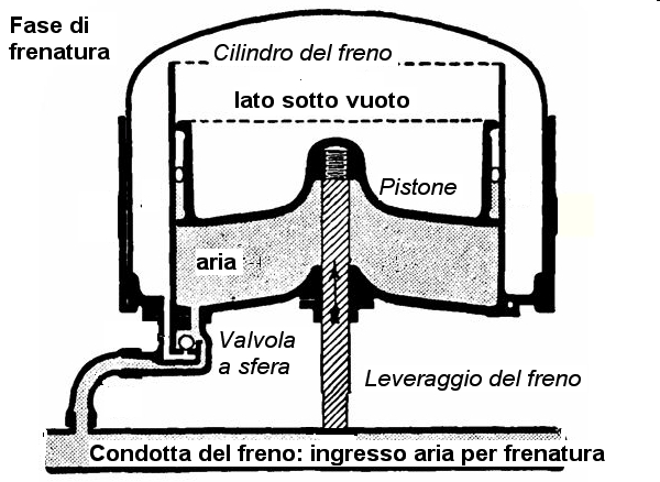 schema di apparecchiatura del freno.